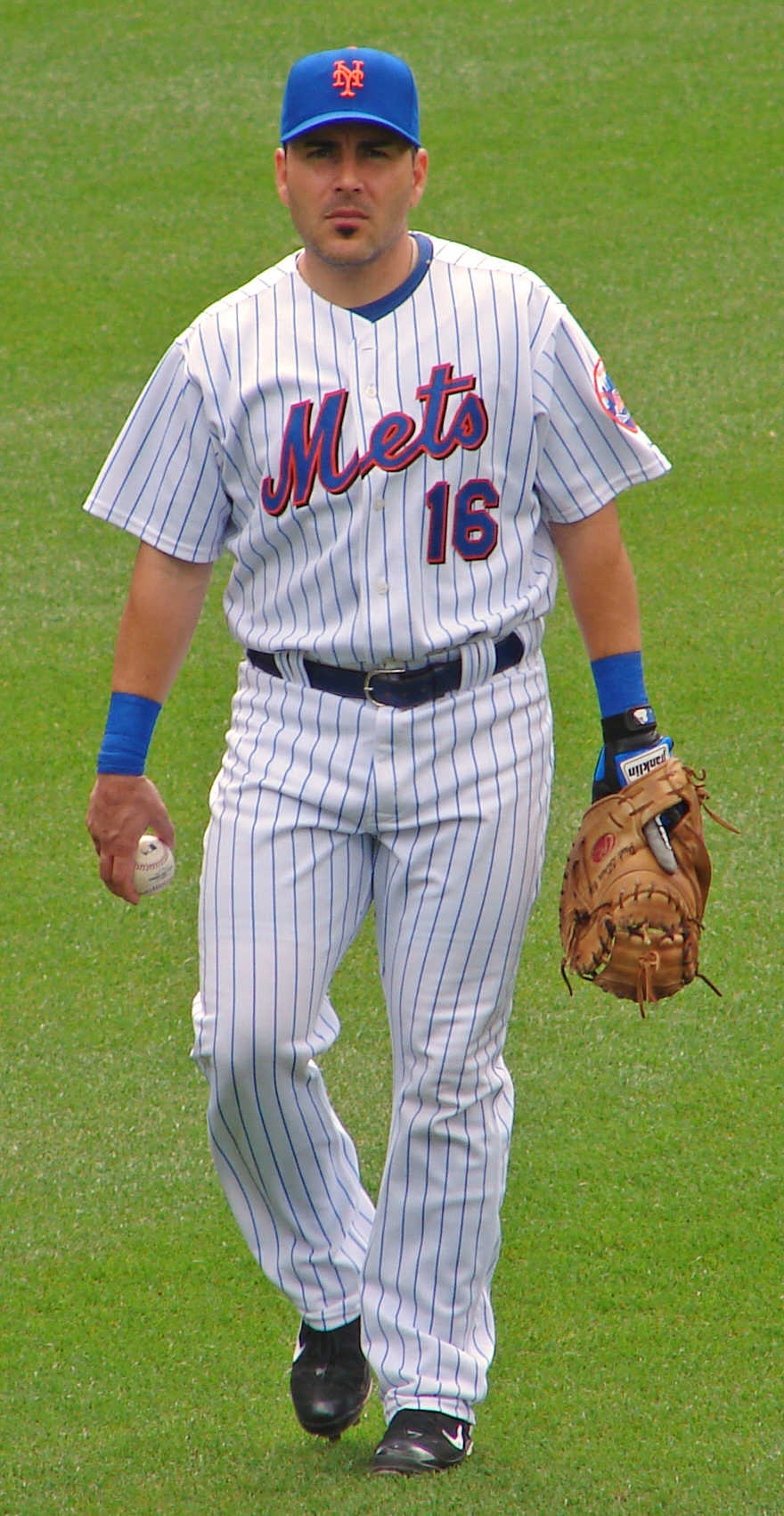 Paul Lo Duca